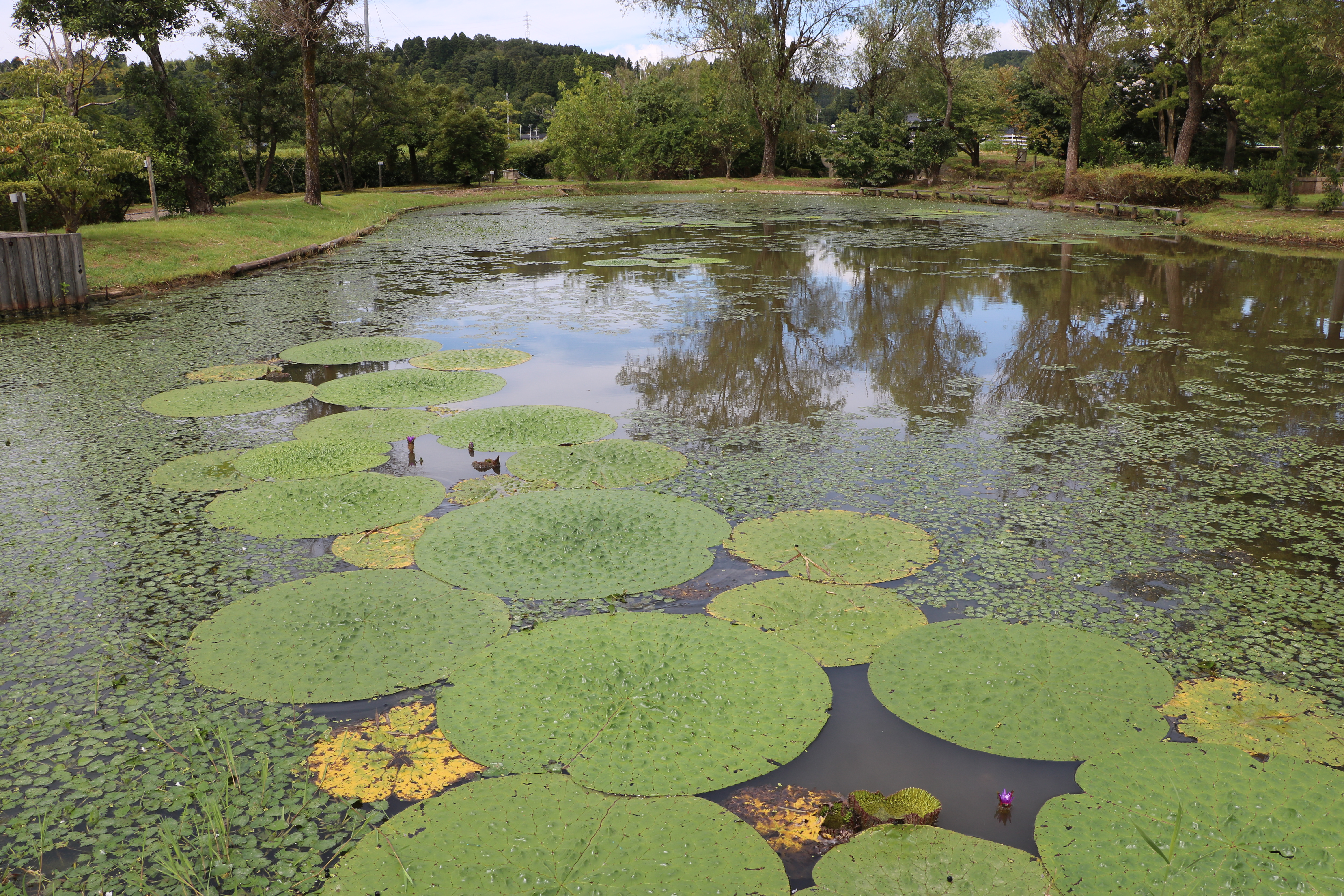 国指定天然記念物。十二町潟オニバス発生地（富山県氷見市）。